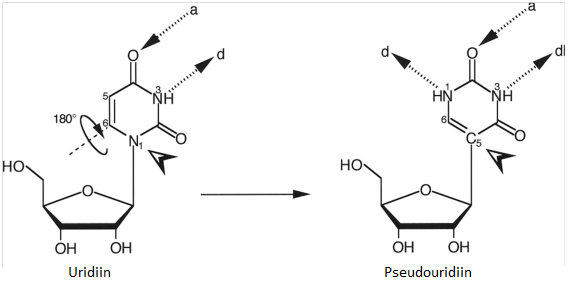 Pseudouridiini ja uridiini erinevus